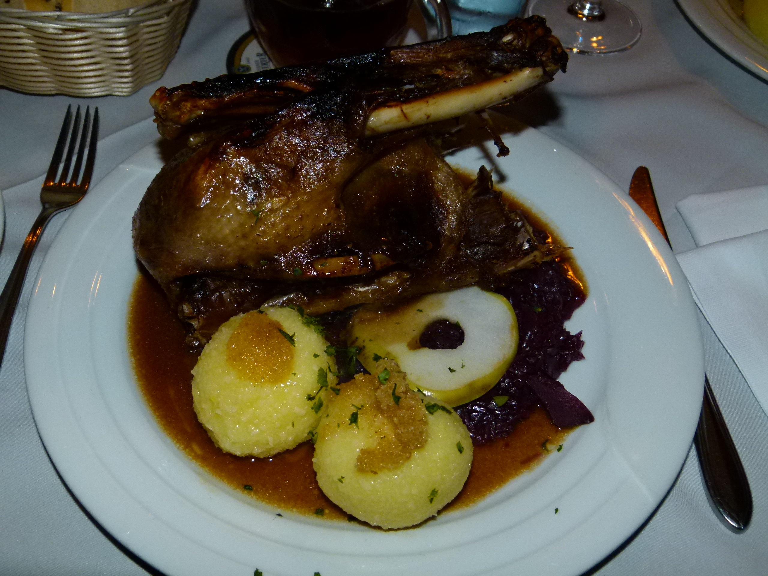 Martinsgans mit Apfelrotkohl und Thüringer Klößen, Restaurant Elbterasse Wachwitz, Dresden